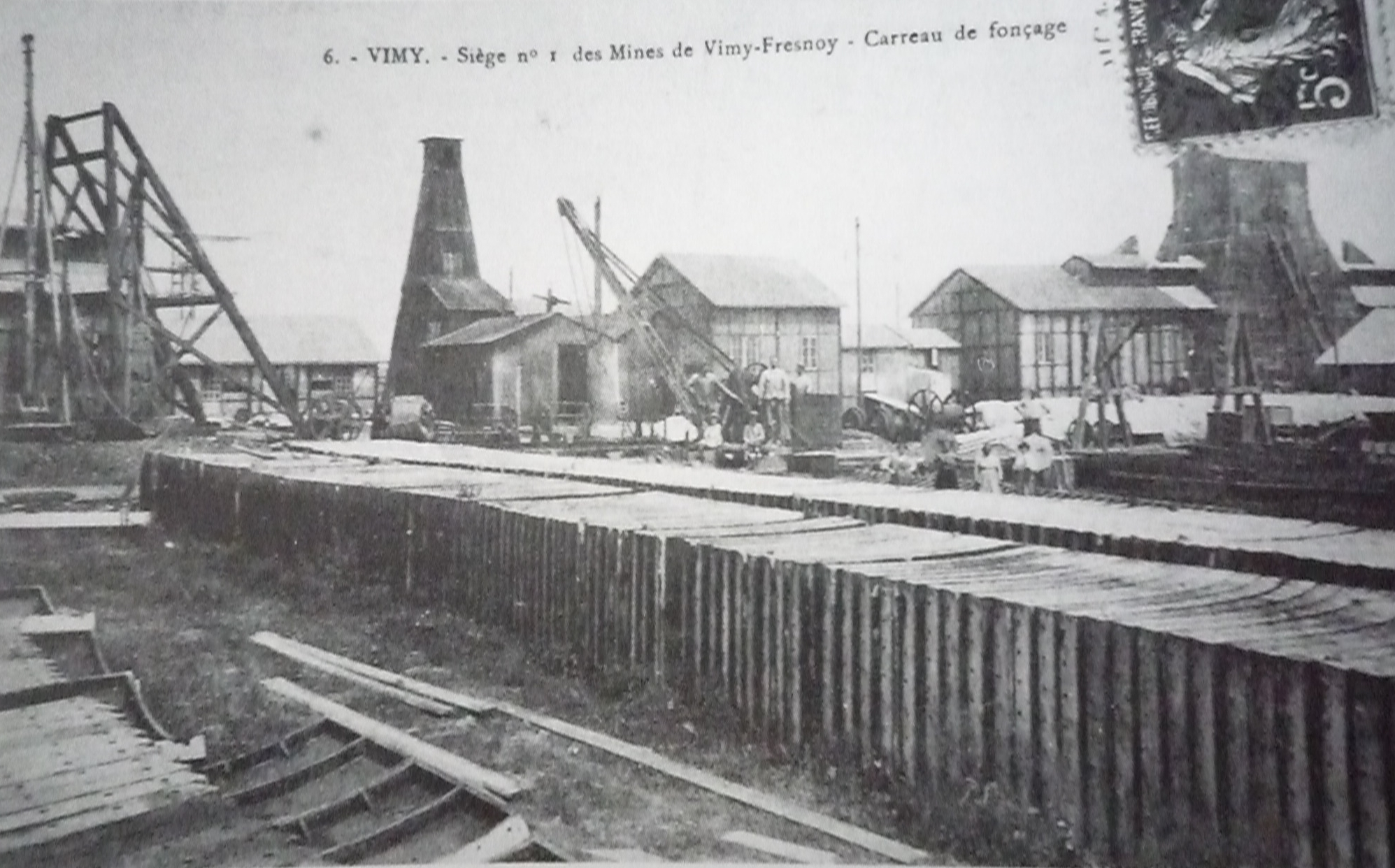 La Fosse n° 1 - 1 bis de la Compagnie des mines de Vimy-Fresnoy était un charbonnage constitué de deux puits situé à Vimy, Pas-de-Calais, Nord-Pas-de-Calais, France.